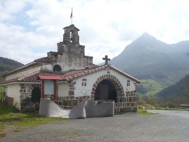 Zaldibiako Saturdiren baseliza eta Larrunarri